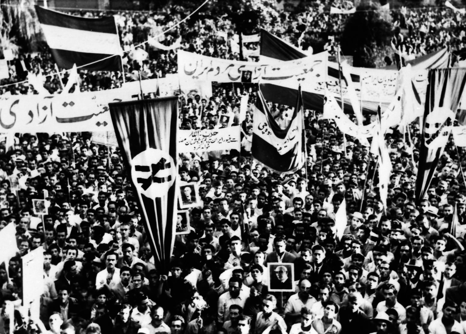 25 مرداد 1332: تظاهرات تهران